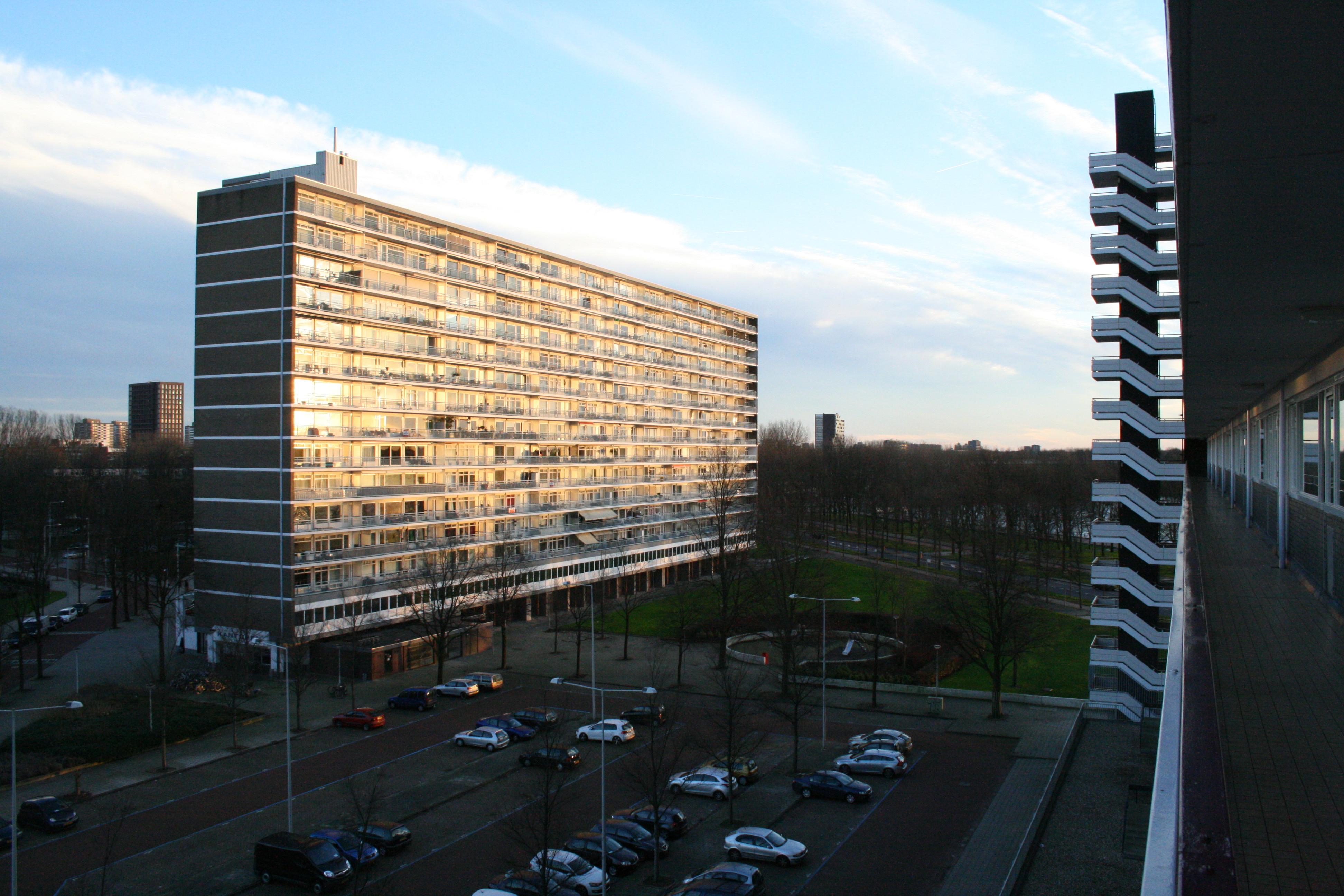 Galerijflat (ontwerp: Piet Zanstra) aan de Burgemeester Hogguerstraat, Amsterdam-Slotermeer, 29 december 2012.